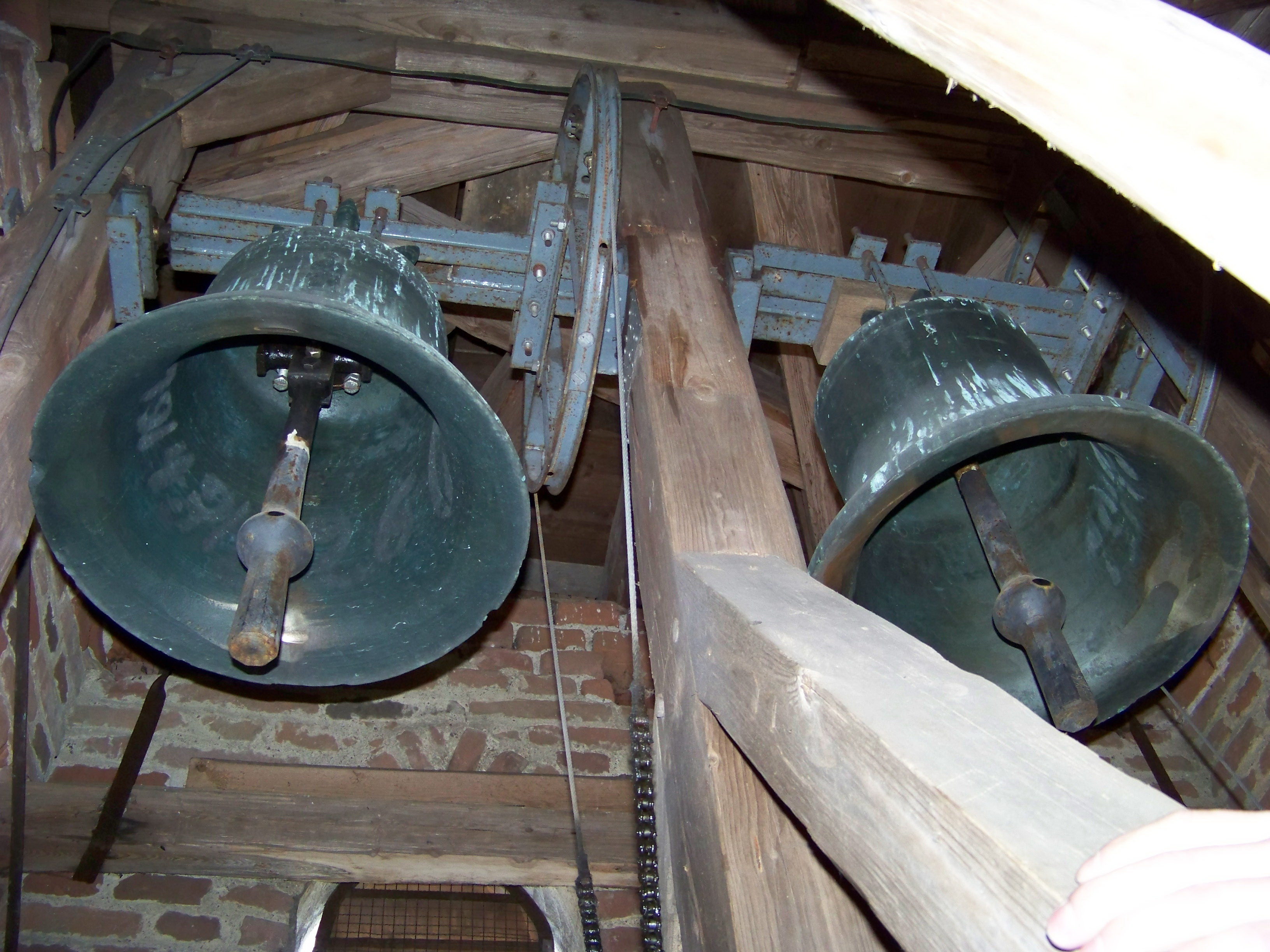 Weihmichl, Stollnried, Kirchstraße 5. Wallfahrtskirche Mariä Himmelfahrt. Saalkirche mit eingezogenem Chor, Anlage des frühen 14. Jahrhunderts, Verlängerung des Schiffes nach Westen 1847. Zwei Glocken im Turm läuten zum Angelusgebet und zu den Gottesdiensten.